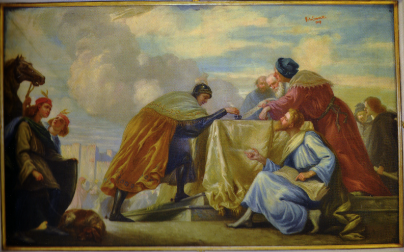 Emancipazione comunale di Gandino, dipinto su tela (1909) di Pietro Servalli. Palazzo del Vicario (ora palazzo comunale), salone della Valle.